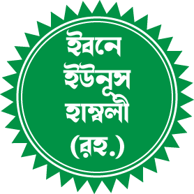 ইবনে ইউনূস হাম্বলীর নামলিপি